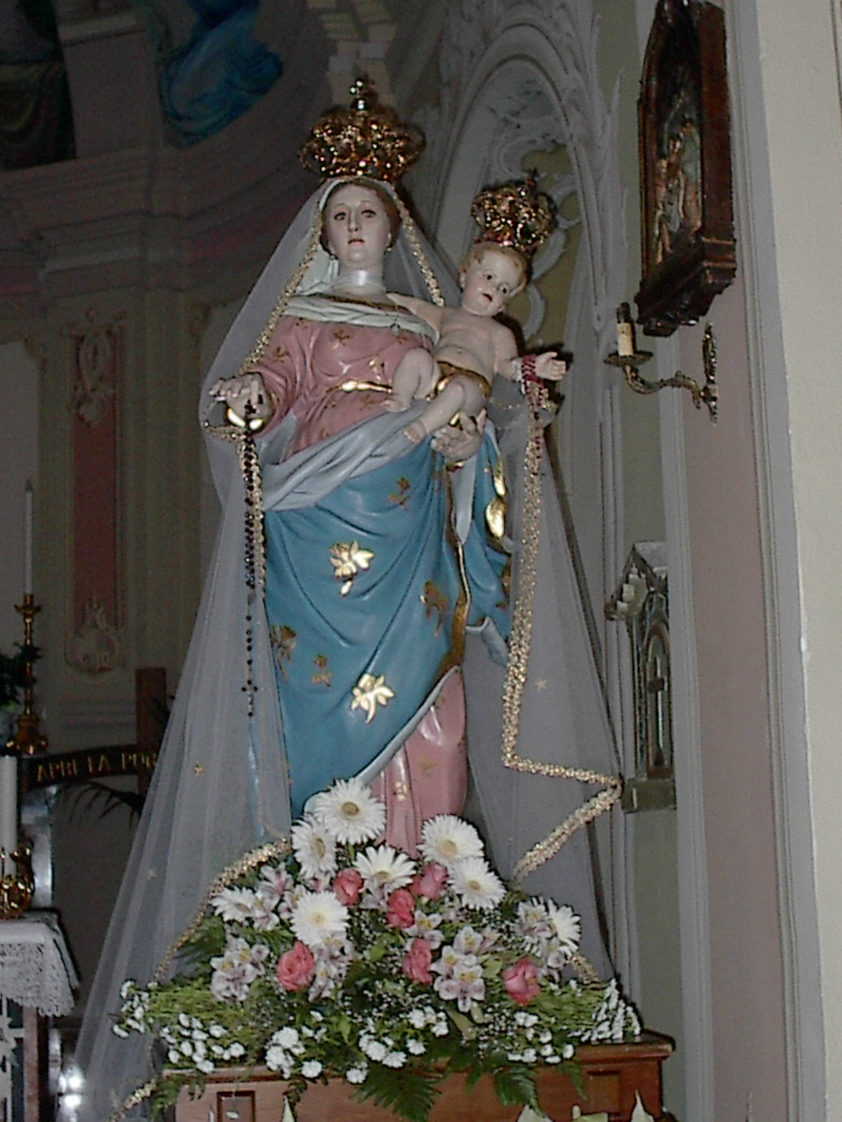 Statua della Vergine delle Grazie venerata in Cicogni di Pecorara (PC)